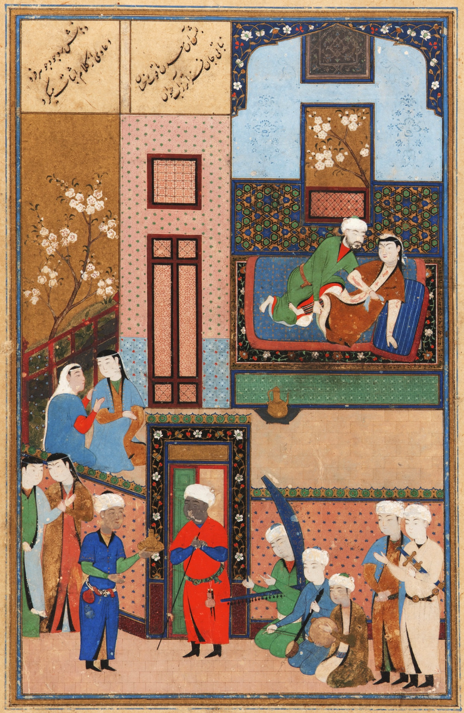 Бракосочетание Михра и принцессы Нахид. «Михр и Муштари» Мухаммада Ассара Тебризи. Бухара,1523 г. Галерея Фрир, Вашингтон (The Wedding of Princess Mihr and Nahid. From a "Mihr-u Mushtari" by Muhammad Assar Tabrizi. Bukhara, Uzbekistan, 1523-1524. Freer Gallery, Smithsonian Institution, Washington, D.C., United States)